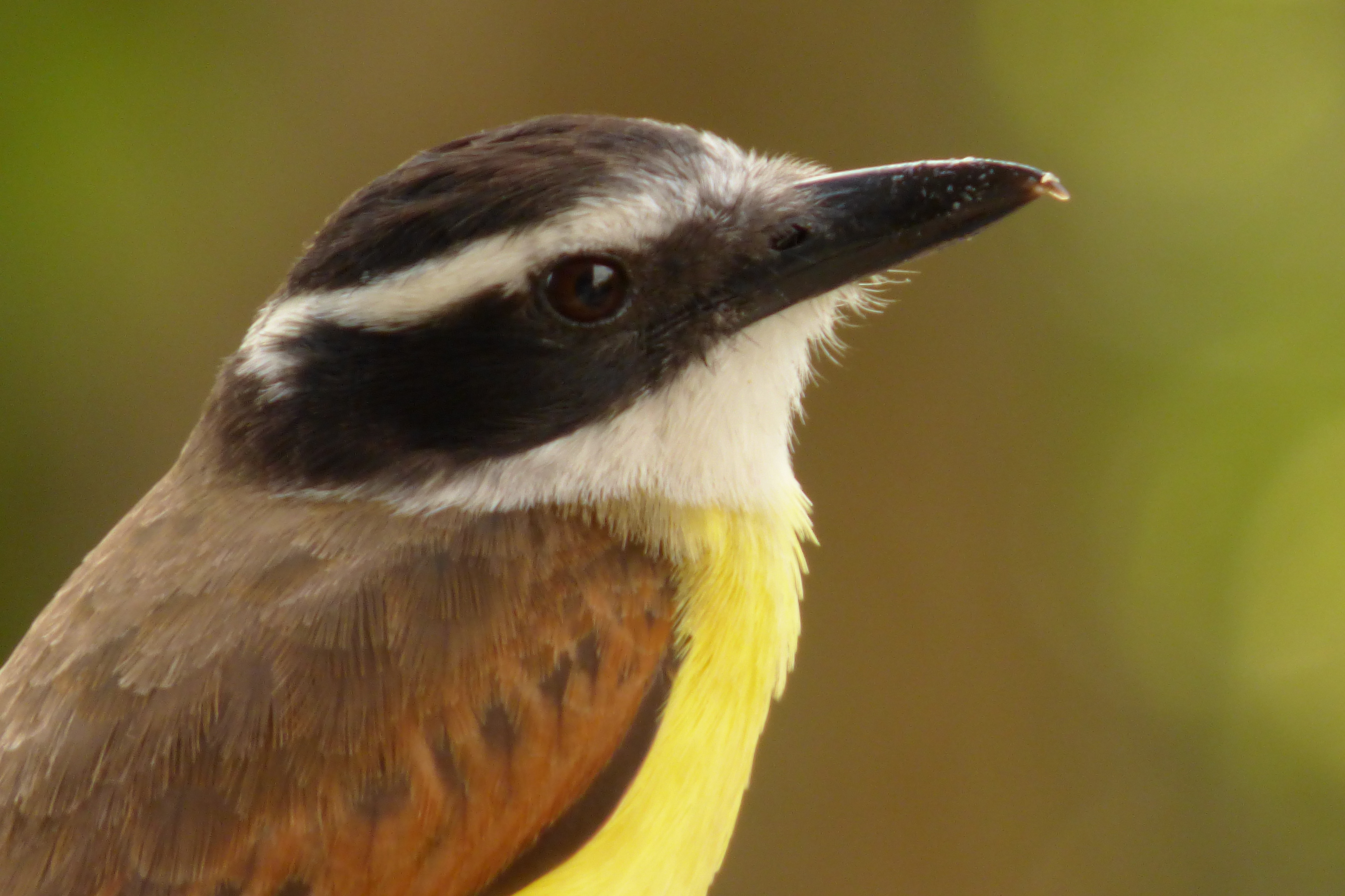 Pitangus sulphuratus (Bichofué gritón)